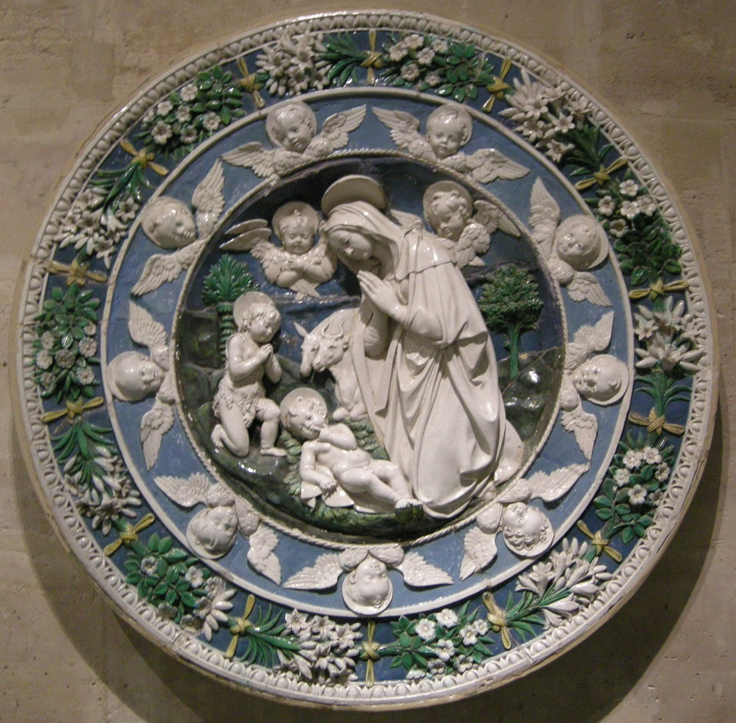 Bottega di andrea e giovanni della robbia, adorazione del bambino.JPG